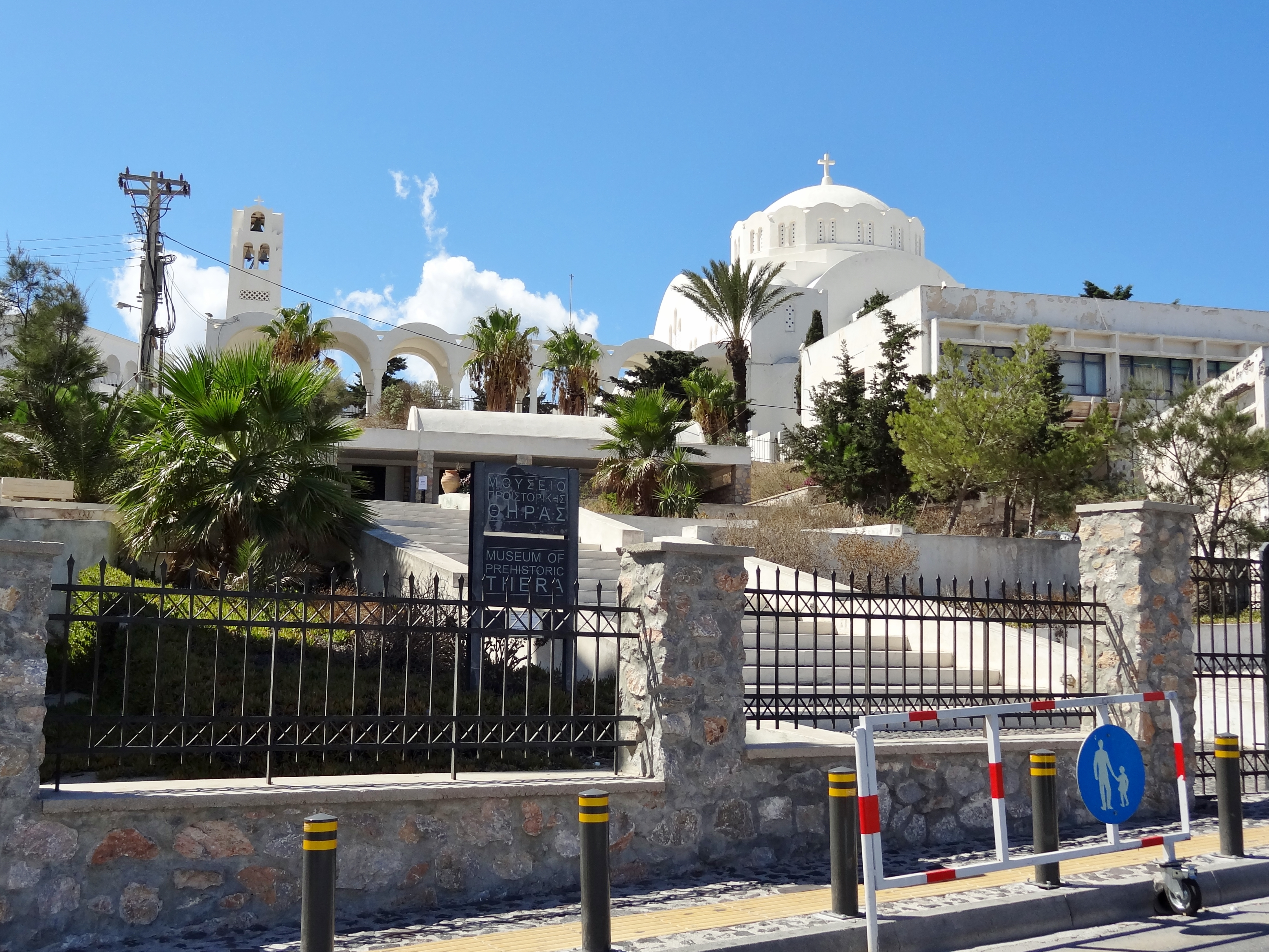 Eingang zum Prähistorischen Museum von Thira, Santorin (Thira), Kykladen, Griechenland